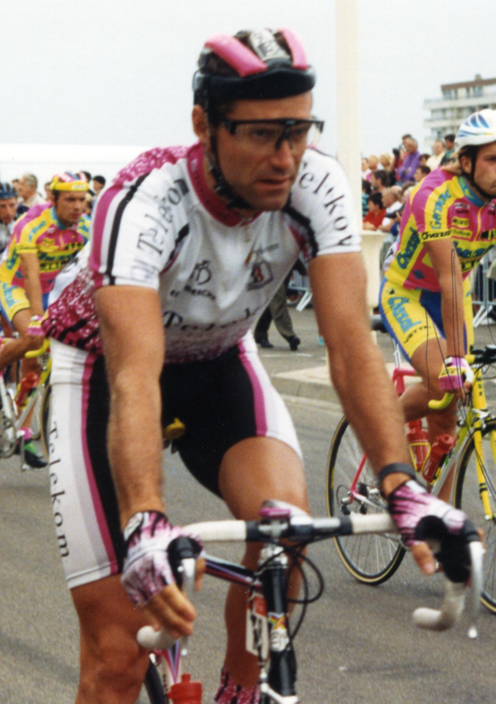 TOUR DE FRANCE 1993